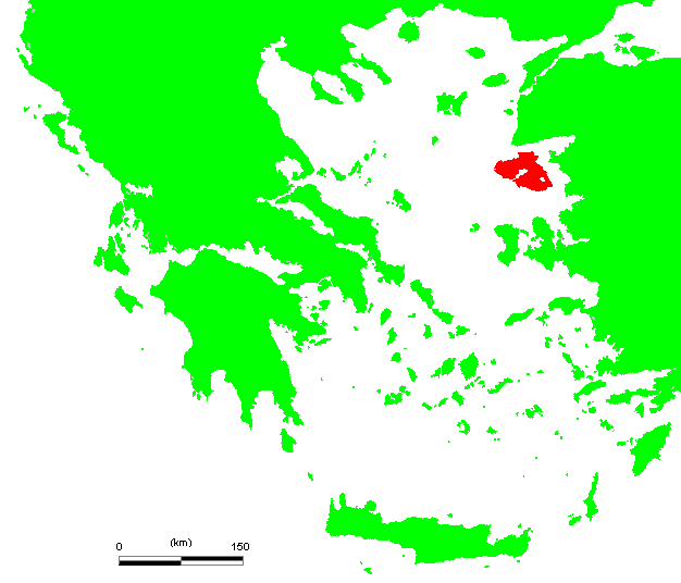 GR Lesvos.PNG (Greek island)